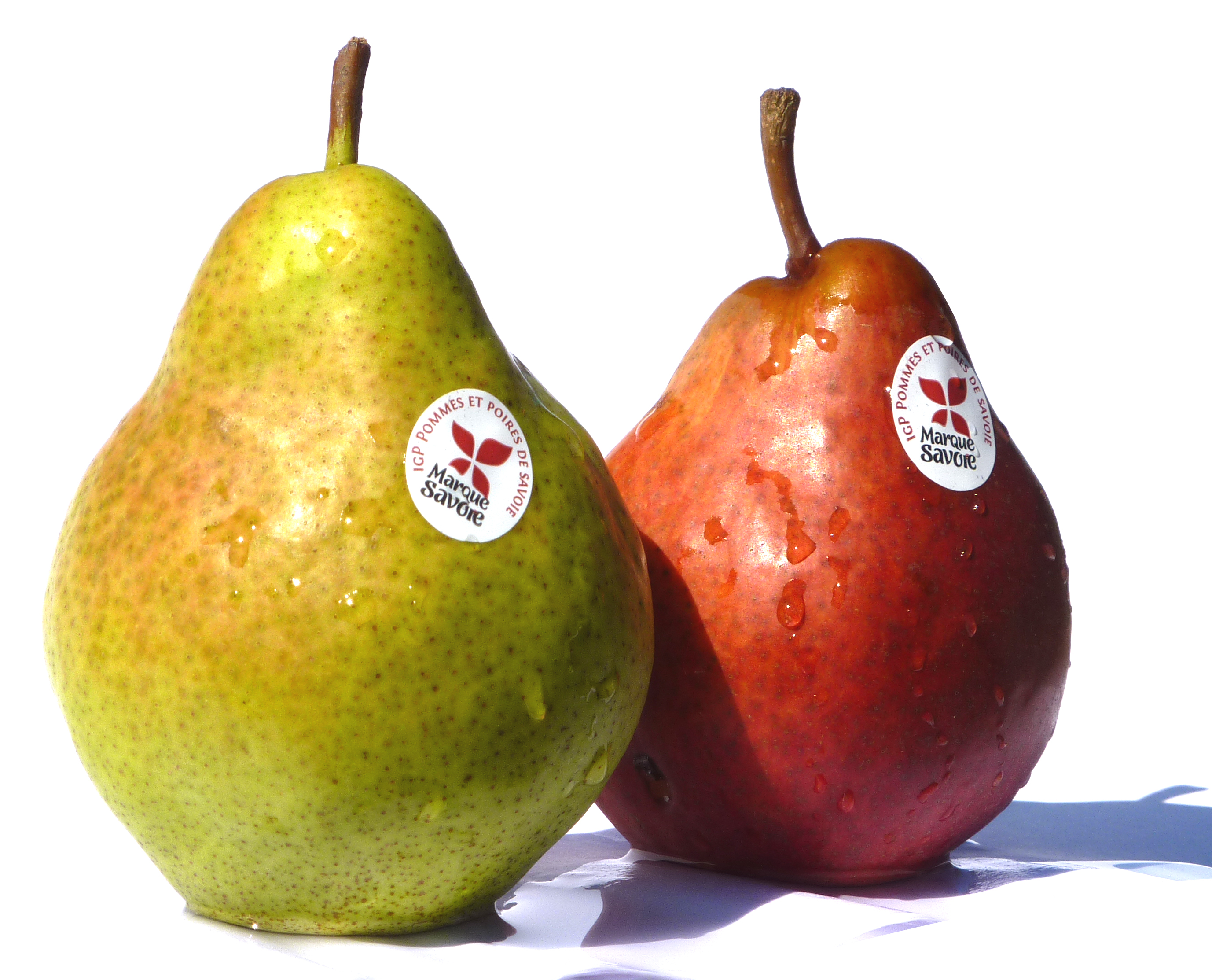 Photo de poires william IGP Pommes Poires de Savoie